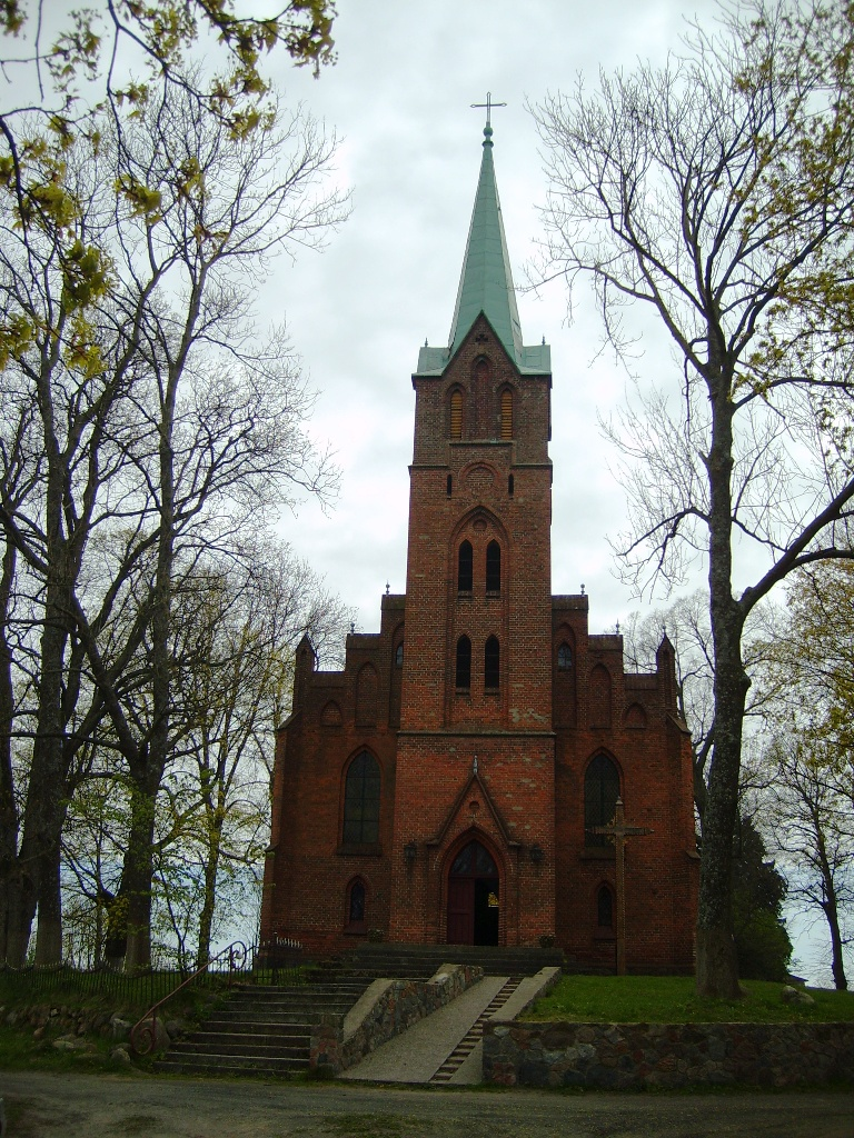 Cecenowo - dawny kościół ewangelicki, obecnie rzymskokatolicki parafialny p.w. Wniebowzięcia NMP, 1867-68